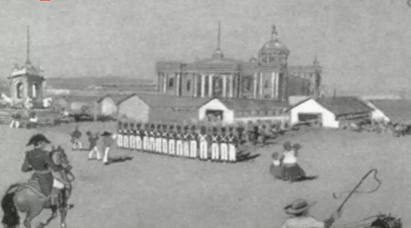 Catedral Metropolitana de Guatemala en 1850.